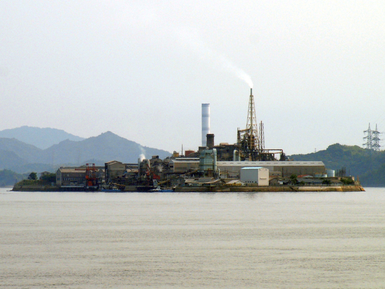 TOHO ZINC CO., LTD. (Chigirishima Island) Osaki Kamijima, Hiroshima, JAPAN